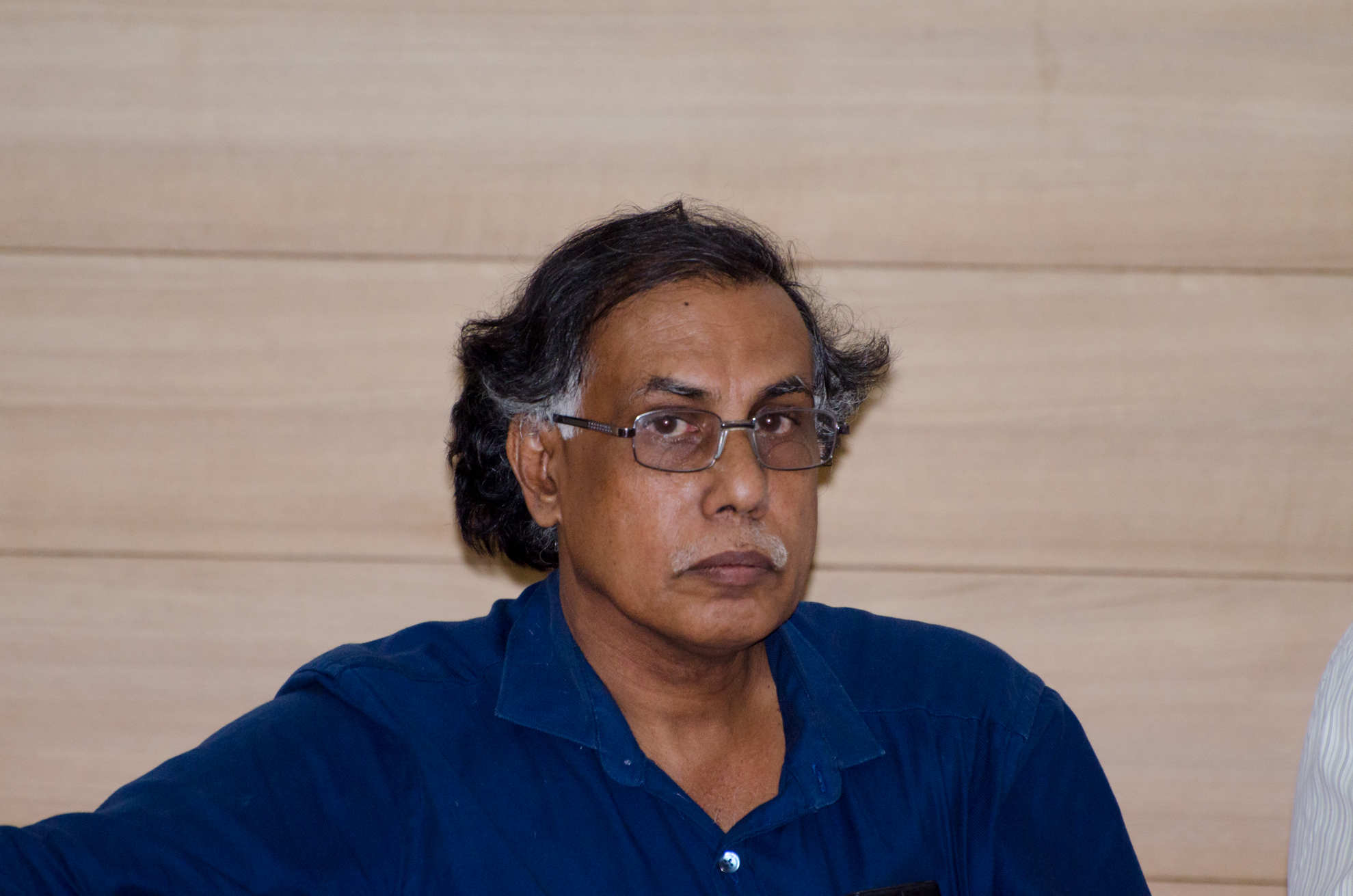 പി.കെ .പാറക്കടവ്